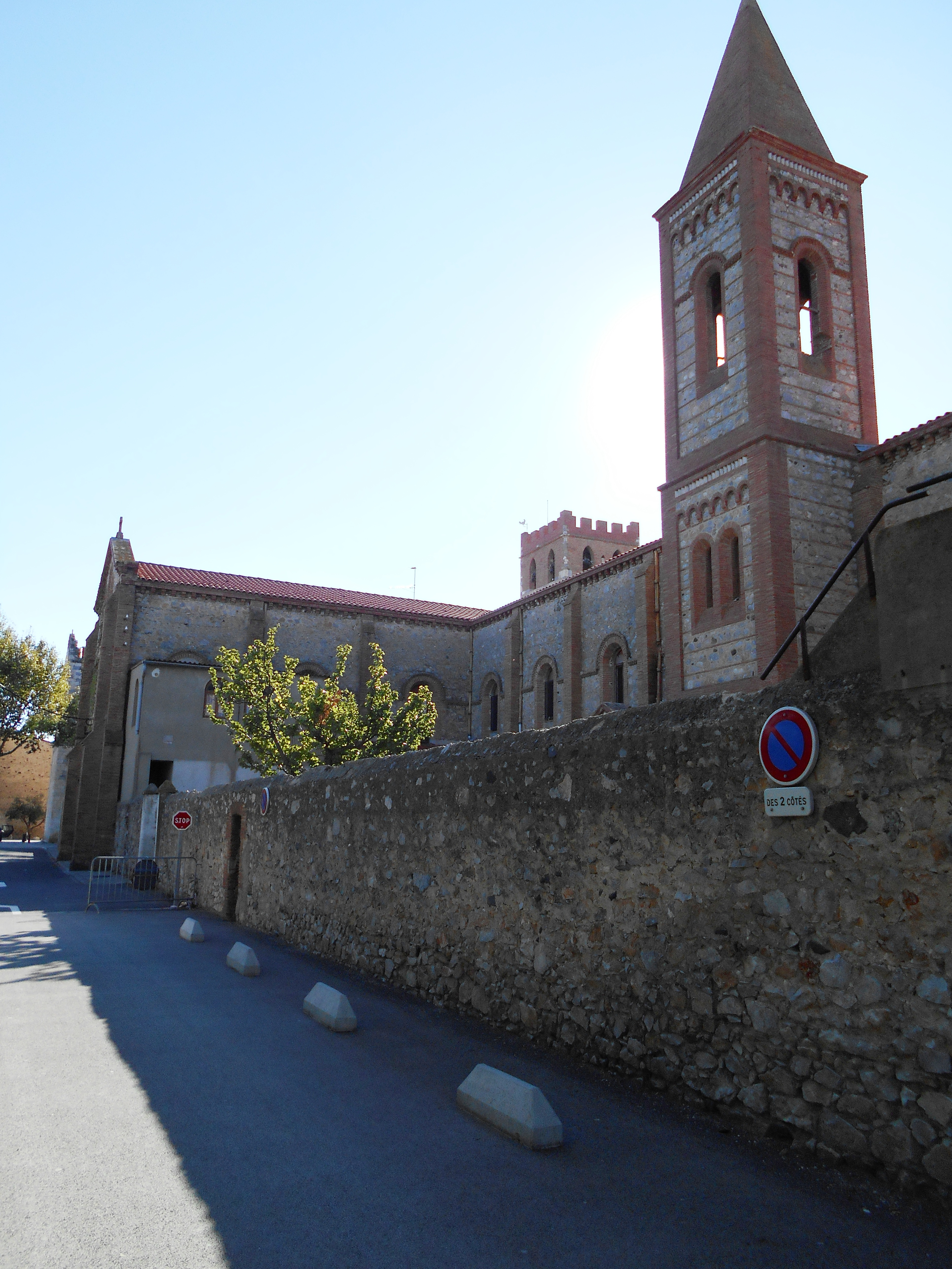 Església de Nostra Senyora dels Àngels d'Espirà de l'Aglí